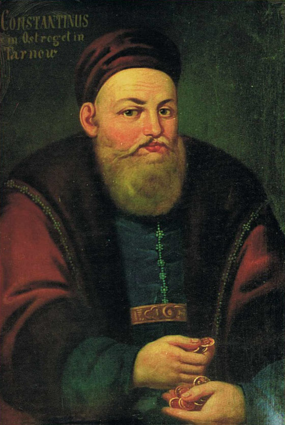 Партрэт Канстанціна (Васіля) Канстанцінавіча Астрожскага Беларуская (тарашкевіца): Партрэт Канстантына Васіля Астроскага (Kanstantyn Vasil Astroski)